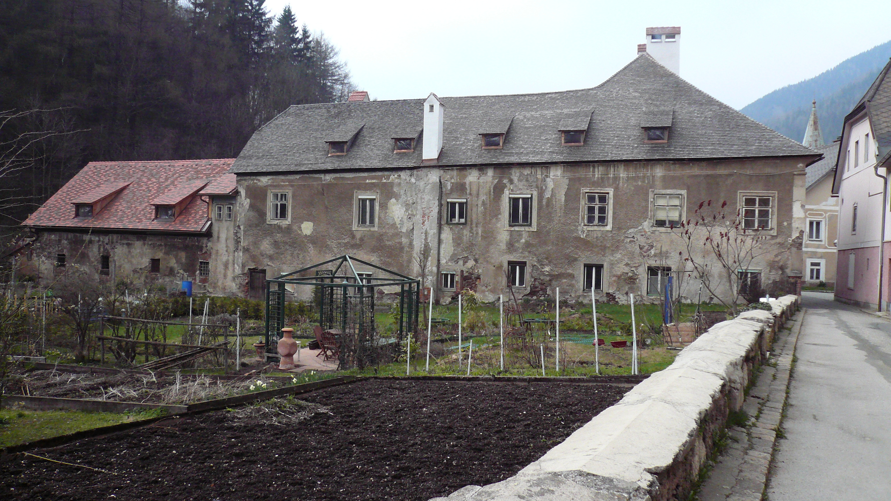 Schwarzer Hof